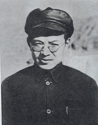 张闻天，1935年-1943年为中共中央总负责人